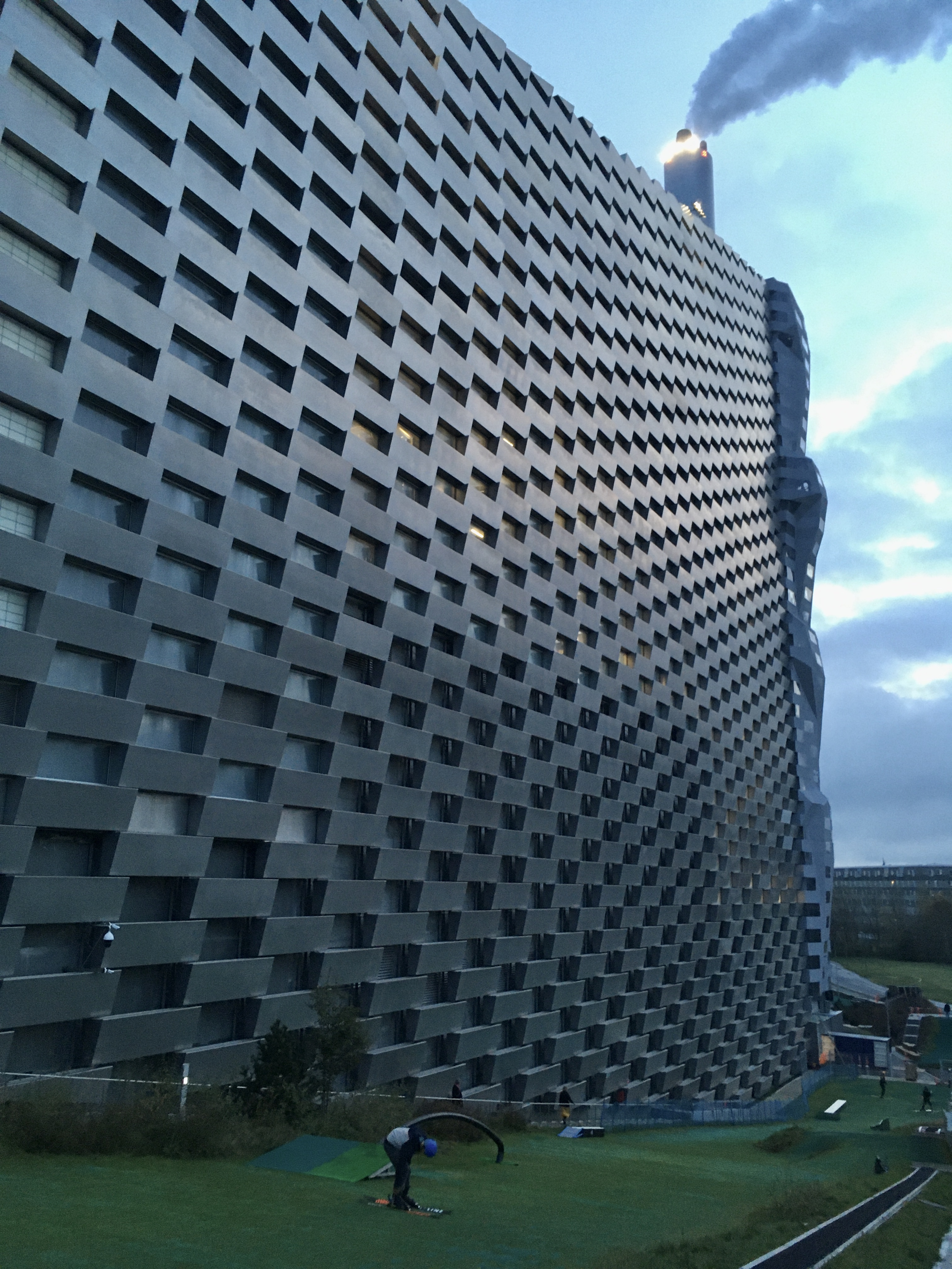 Skiing in Amager Bakke, Copenhagen